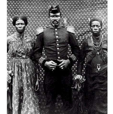 Moukoko Manyanye "King Pass All" Roi des Malimba et ses épouses (1903)